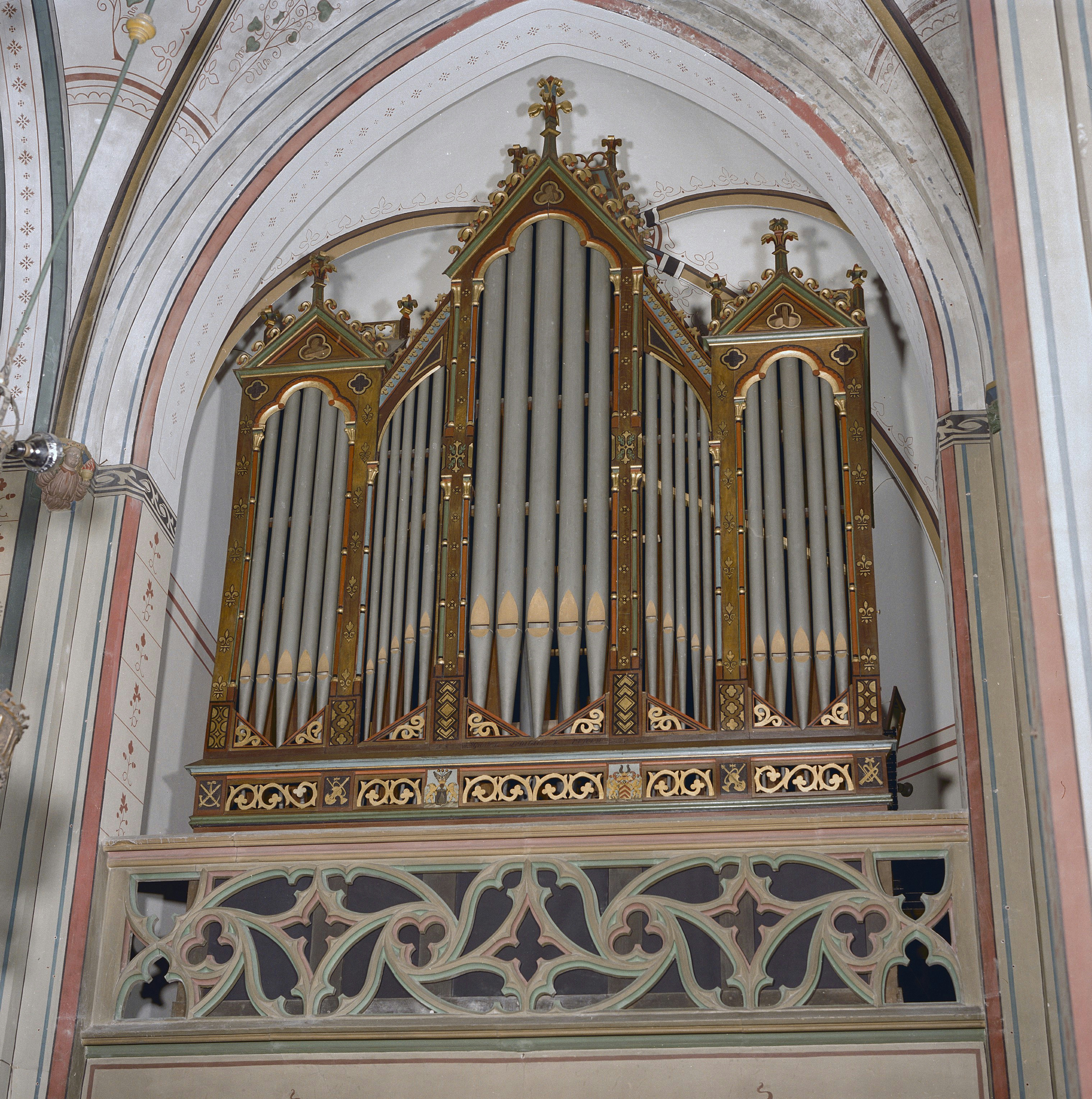 ROOMS-KATHOLIEKE KERK (SINT WILLIBRORD): INTERIEUR, ORGEL (GERESTAUREERD)